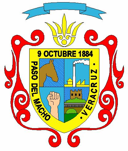 EL ESCUDO DE PASO DEL MACHO, FUE CREADO POR EL ARQ. ABEL COLORADO SAINZ EN 1984, COMO RESULTADO DEL CONCURSO CELEBRADO EN EL MARCO DEL CENTENARIO DE LA FUNDACIÓN DEL MUNICIPIO. MAS TARDE, FUE REDISEÑADO POR EL ARQ. ROMAN F. BERMUDEZ SANCHEZ. LA IMAGEN QUE SE MUESTRA FUE DIGITALIZADA POR EL LIC. OSCAR JUSTINO GARCIA GALINDO, RESPETANDO LA DESCRIPCION QUE IGUALMENTE ES DEL MISMO AUTOR.